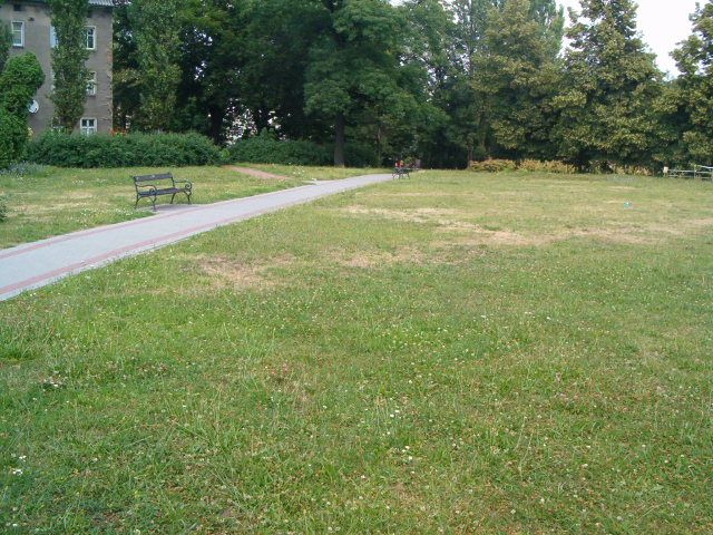 Tutaj znajdowała się synagoga w Raciborzu